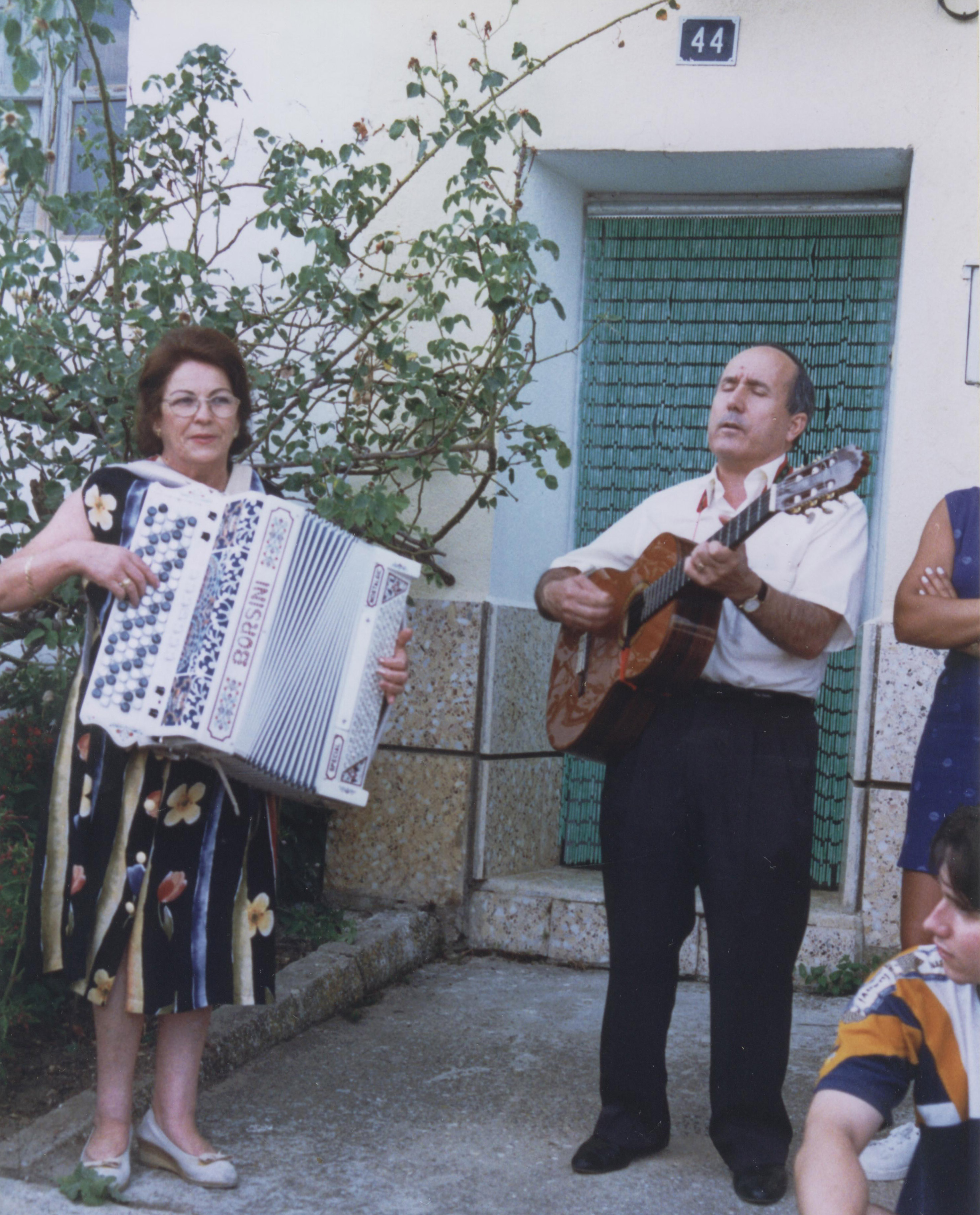 Amelia Valcárcel toca l'acordió junt a Fermín Pardo.